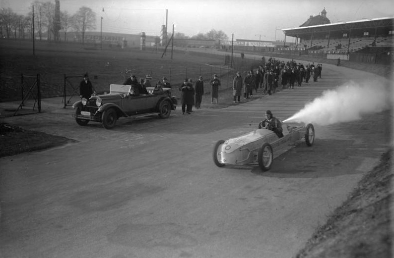 Die erste erfolgreiche Versuchsfahrt des Valier' s-Rückstosswagen mit flüssigem Betriebsstoff auf der Avusbahn in Berlin ! Der Erfinder Max Valier auf seinem "Rak. VI", einem Rückstoss-Versuchswagen, in voller Fahrt bei seinen Versuchen auf der Avusbahn in Berlin.